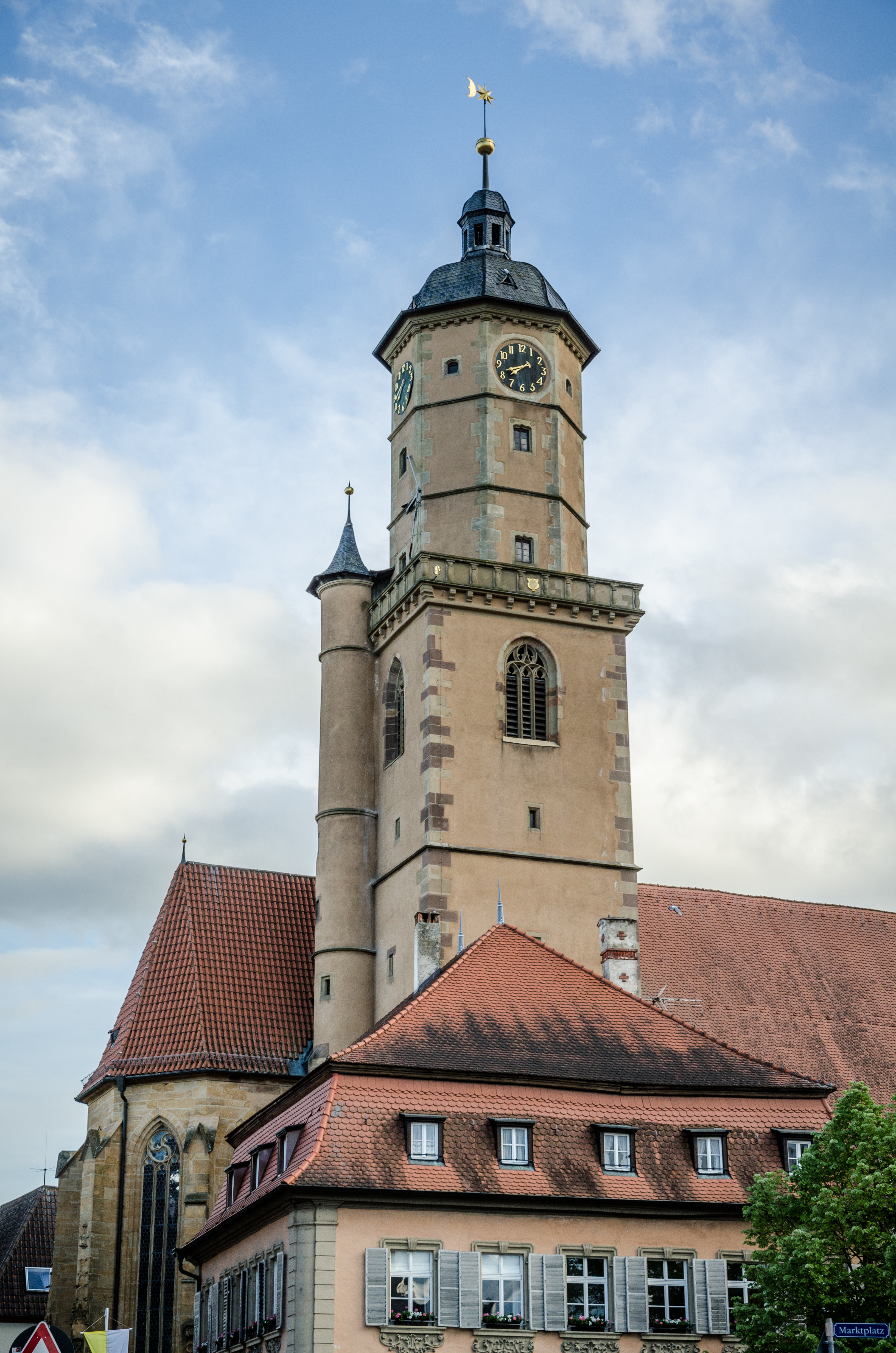 Volkach, Stadtpfarrkirche St. Bartholomäus und St. Georg